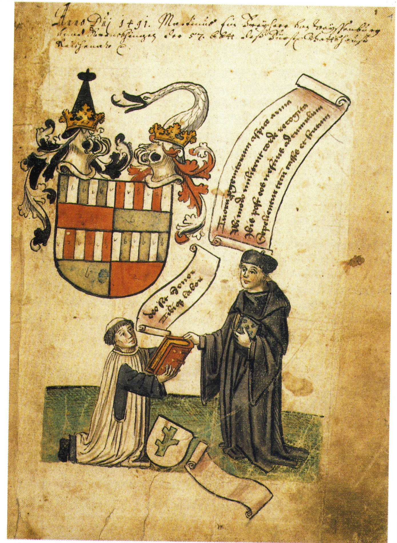 Gallus Öhem überreicht seine Reichenauer Chronik dem Abt Martin (von Weißenburg). UB Freiburg Hs. 15, Bl. 1r